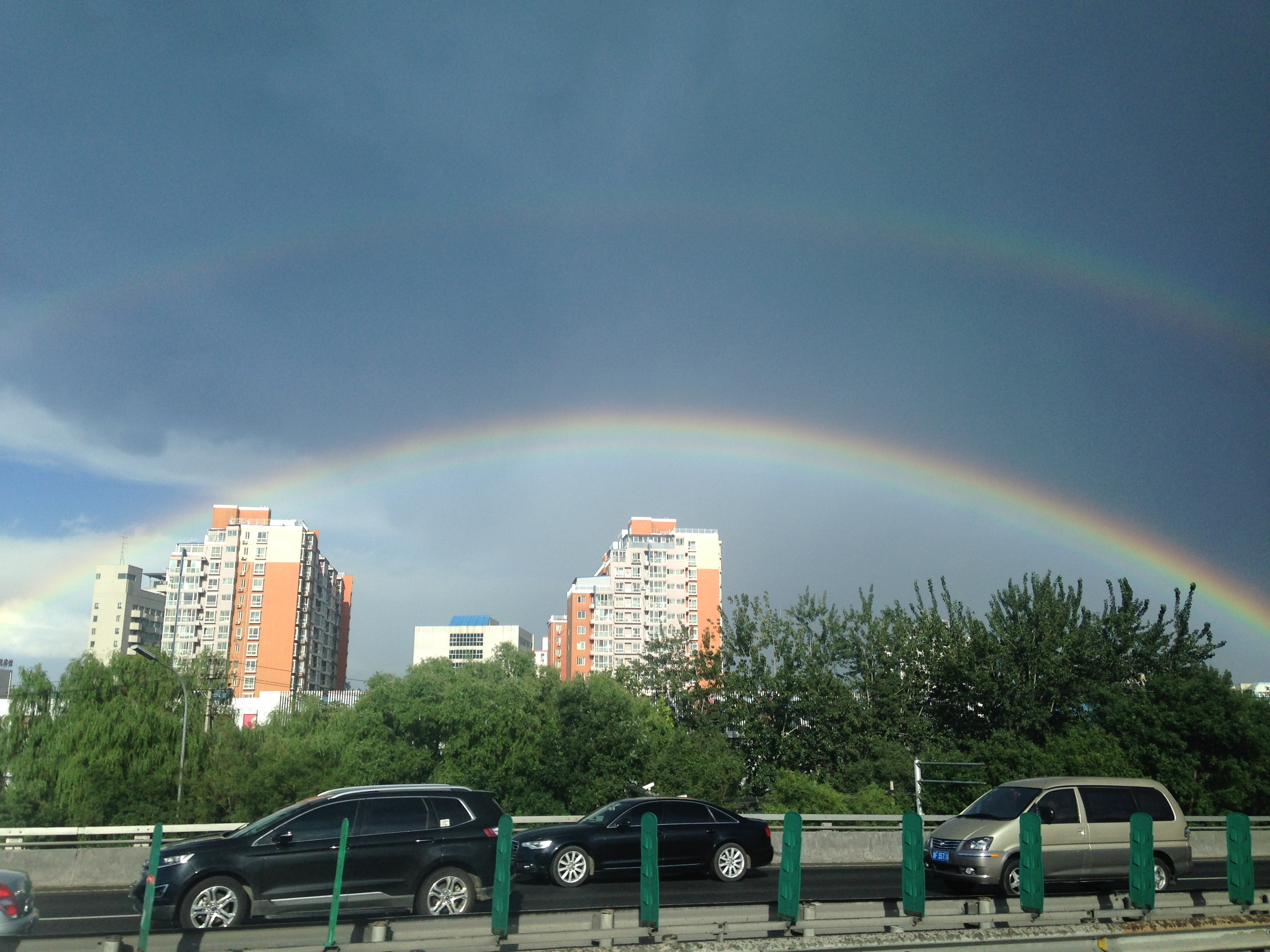 海淀区清河街道付近の虹